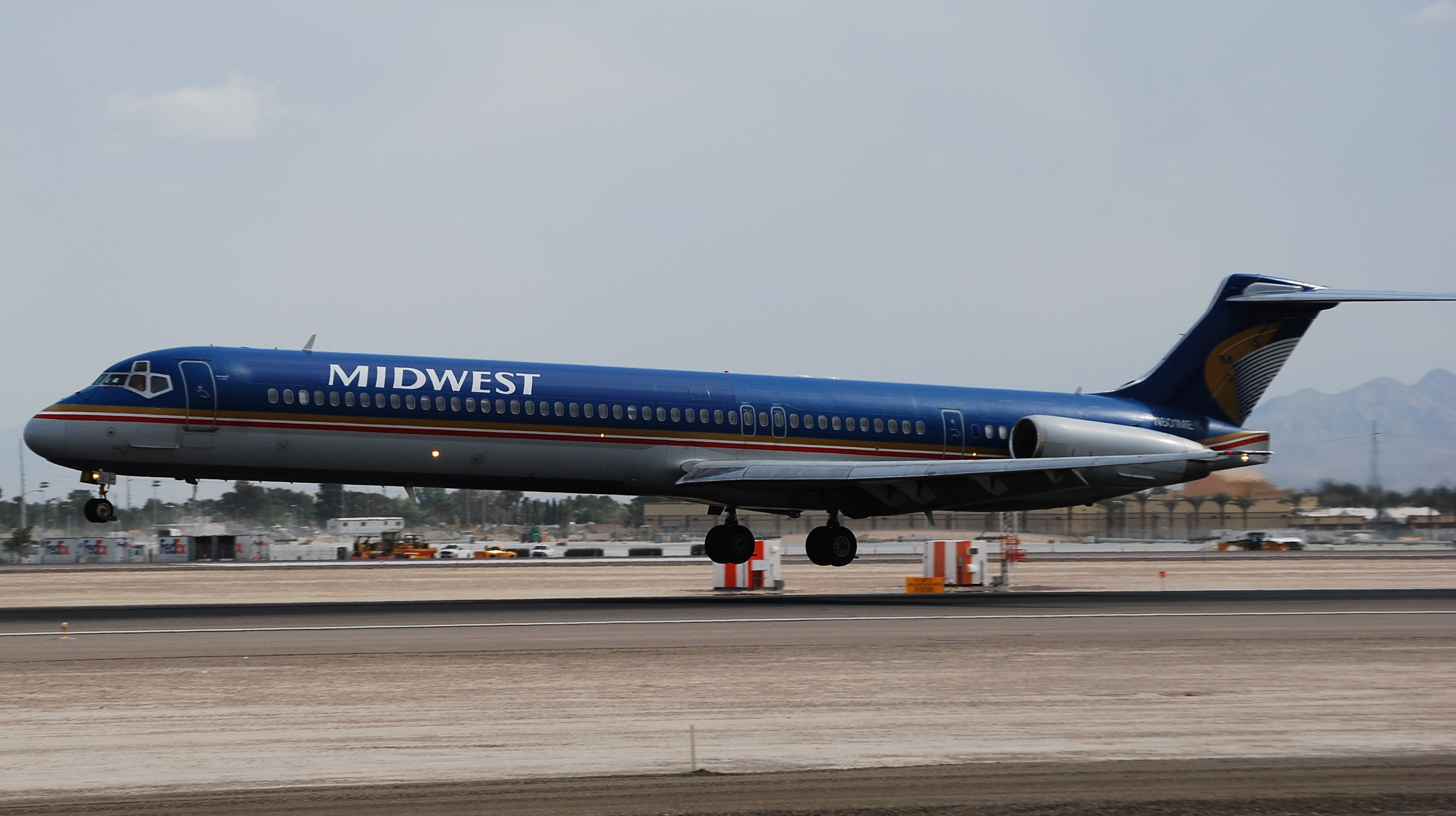 MIDWEST MD83